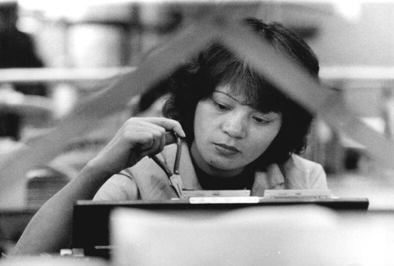 Berlin, vietnamesische Gastarbeiterin ADN-ZB Zimmermann 3.3.89 Berlin: Frauen im EAB- Jede dritte der insgesamt 9.000 Beschäftigten im Berliner Stammbetrieb des Kombinates Automatisierungsanlagenbau ist eine Frau. Mit dem weiteren Ausbau des Großbetriebes in Richtung Mikroelektronik entstehen besonders für sie neue interessante Arbeitsplätze. Eine von insgesamt 18 vietnamesischen Montiererinnen in der elektronischen Baugruppenfertigung ist die junge Nguyen Thi Oan. Sie kam aus der im Norden Vietnams gelegenen Stadt Hai Hun nach Berlin. Siehe auch 1989-0303-18N und 19N.